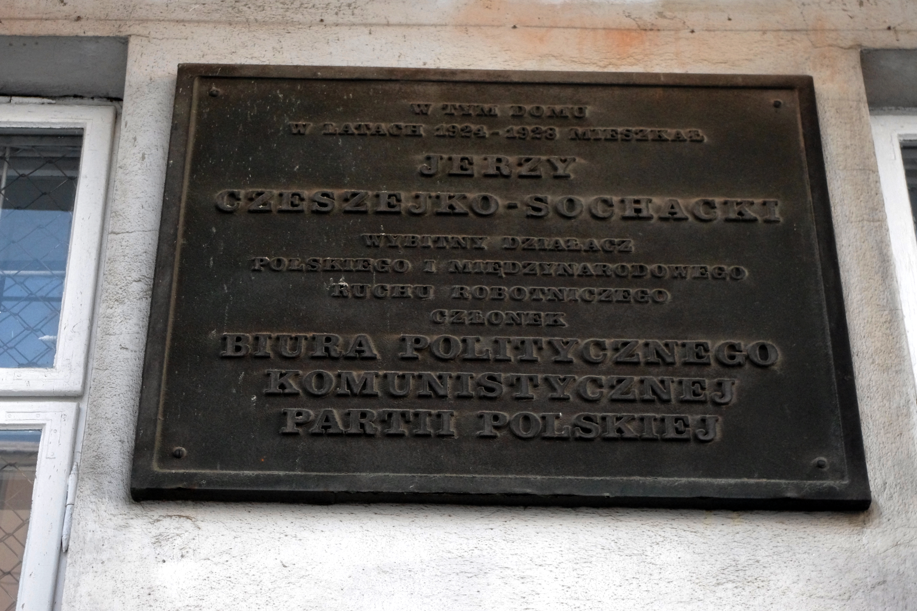 Tablica upamiętniająca działacza komunistycznego i jednego z liderów KPP – Jerzego Czeszejko-Sochackiego, na kamienicy przy ul. Stalowej 2 na warszawskiej Pradze, gdzie mieszkał w latach 1924-1928